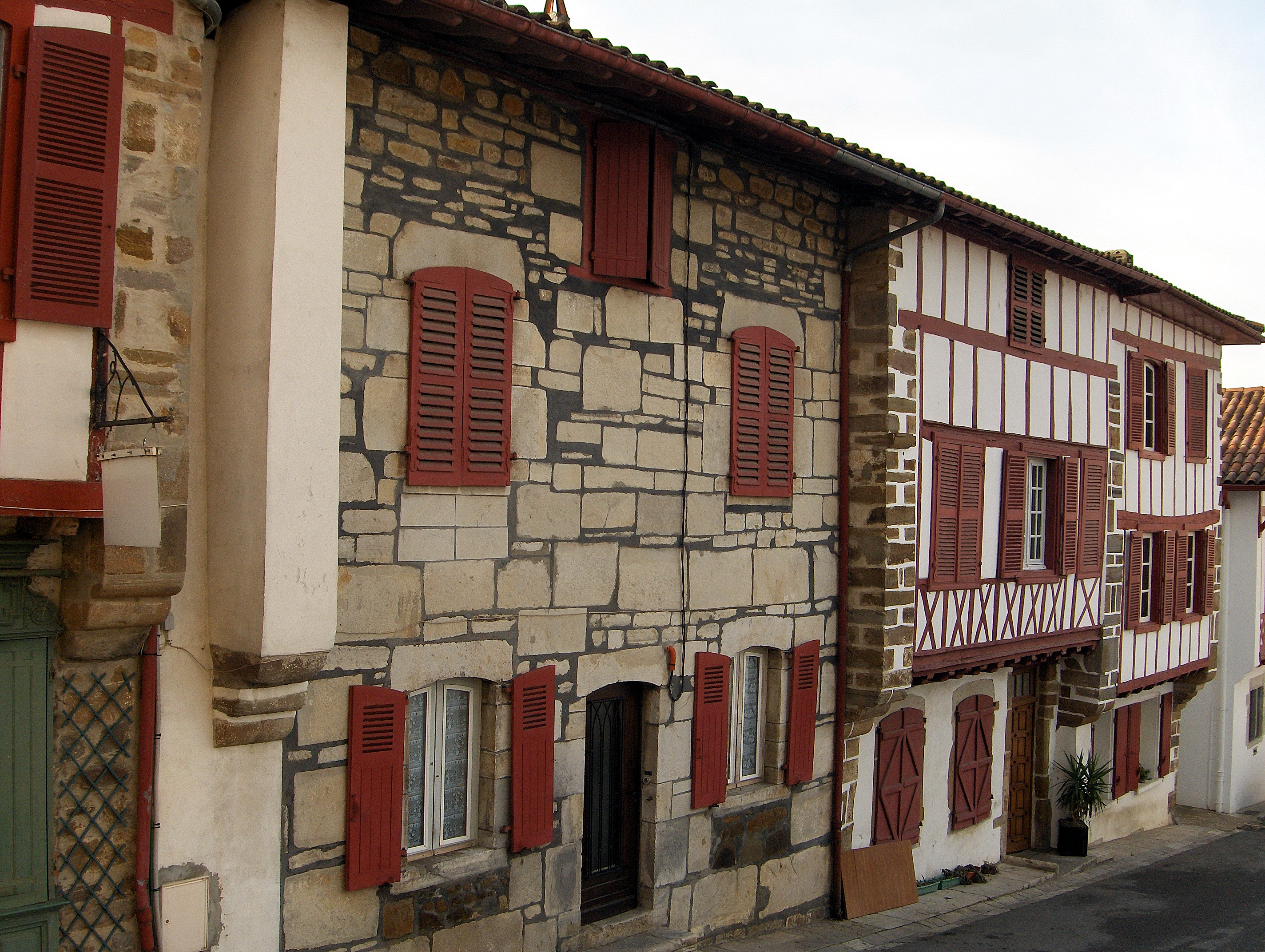 Photo de La Bastide-Clairence, Pyrénées-Atlantiques, France. Photo prise par Jibi44 en janvier 2007.